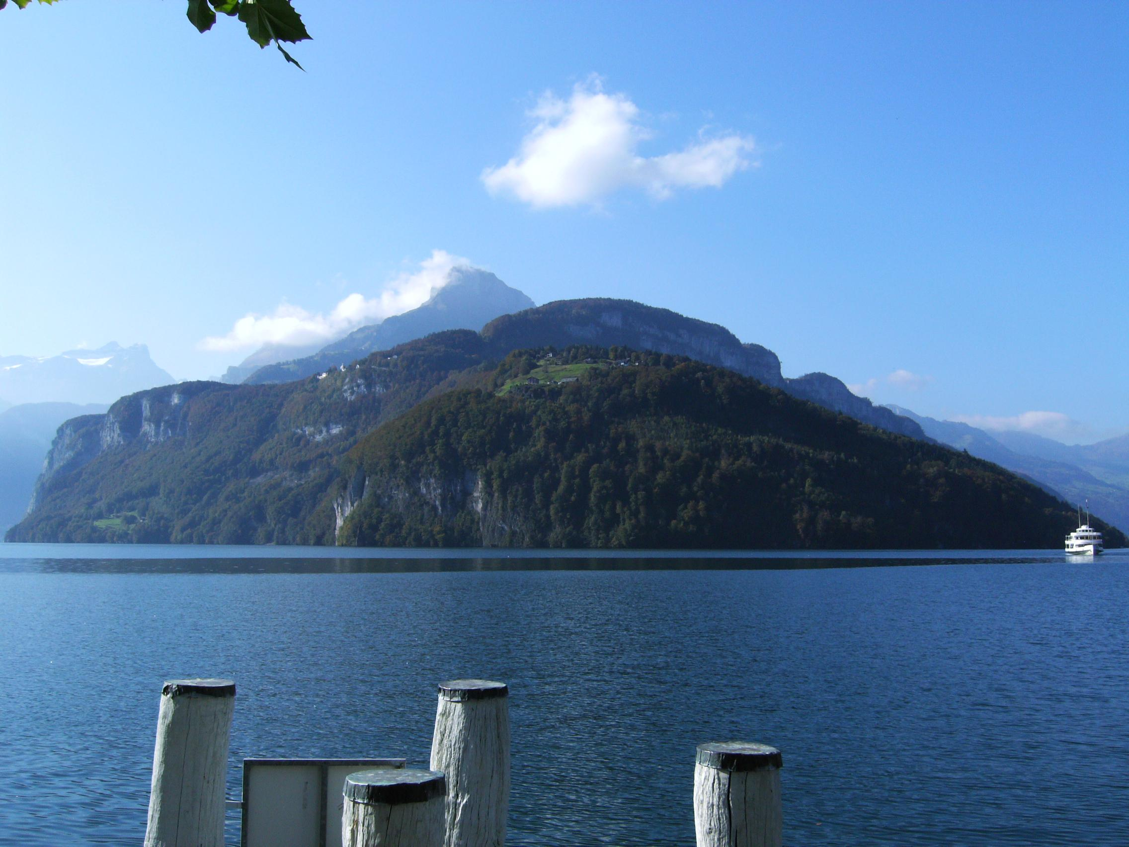 Suisse. Lac des Quatre Cantons, le village sur la première montagne est celui de Seeliberg, la montagne qui pointe en arrière-plan est l'Oberbauenstock. Prise de la photo depuis Brunnen, commune d'Ingenbohl (SZ, Suisse).